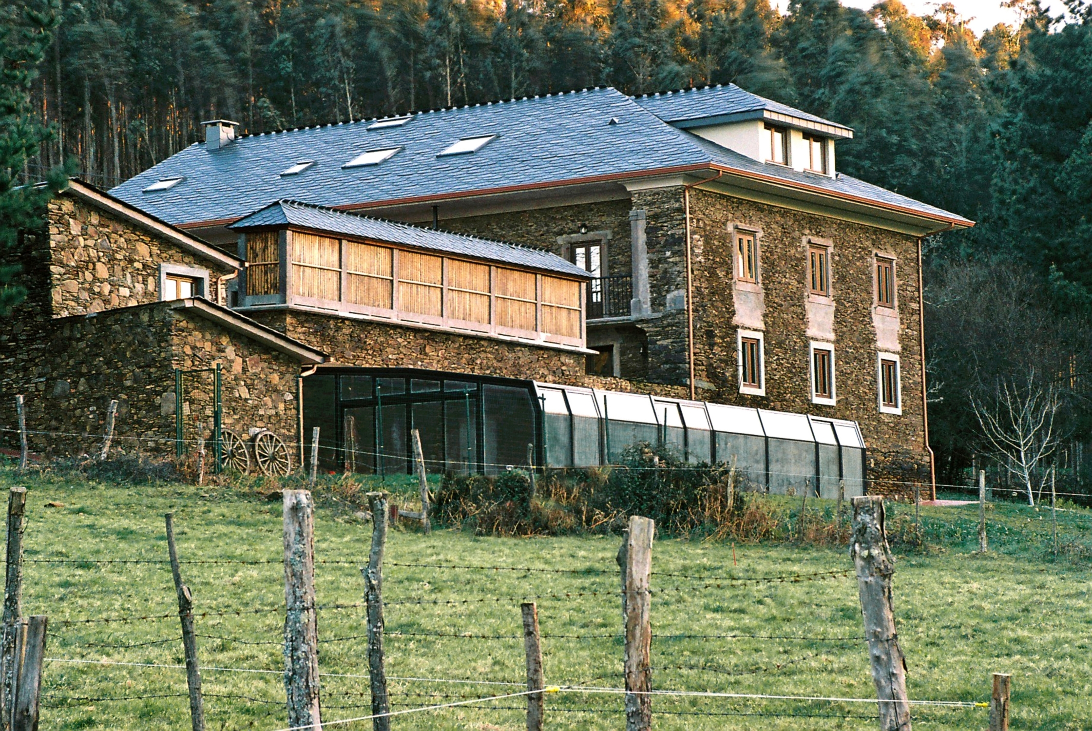 Hotel de naturaleza a via láctea, A Barqueira, Cerdido